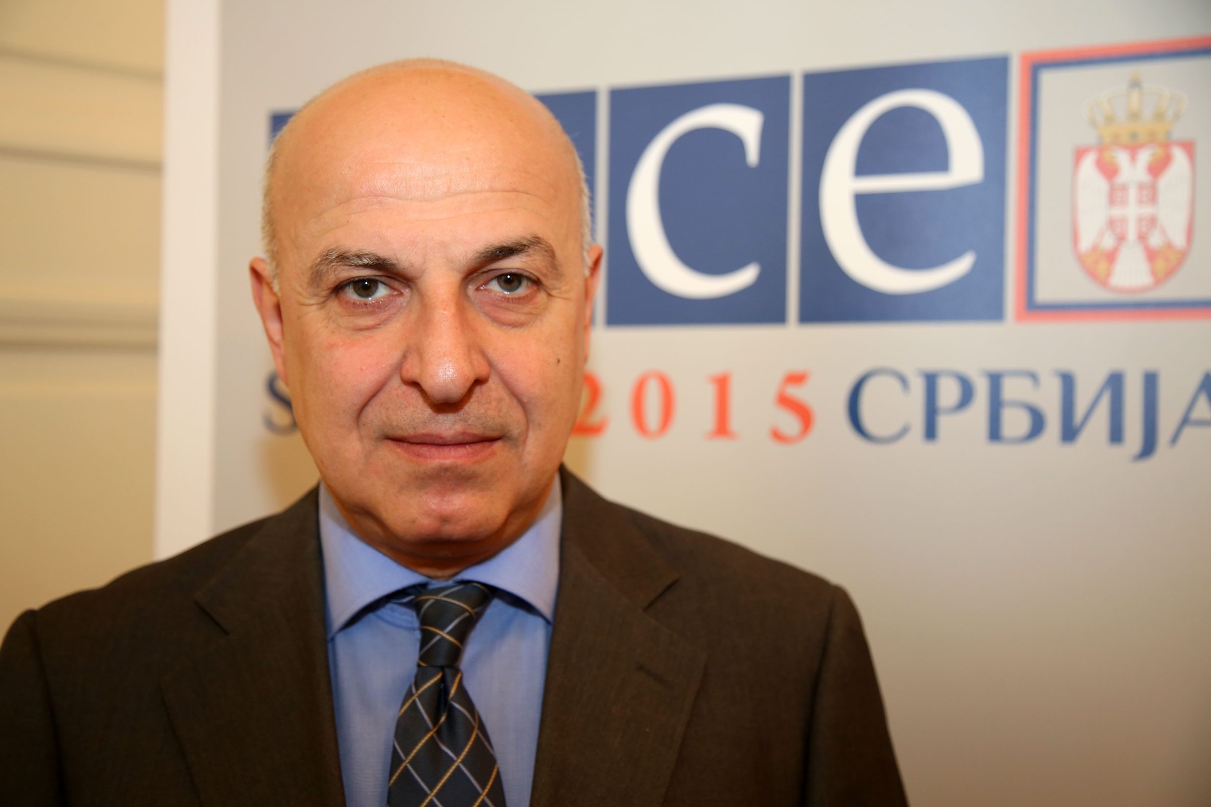 Chechelashvili_-Valeri-3788